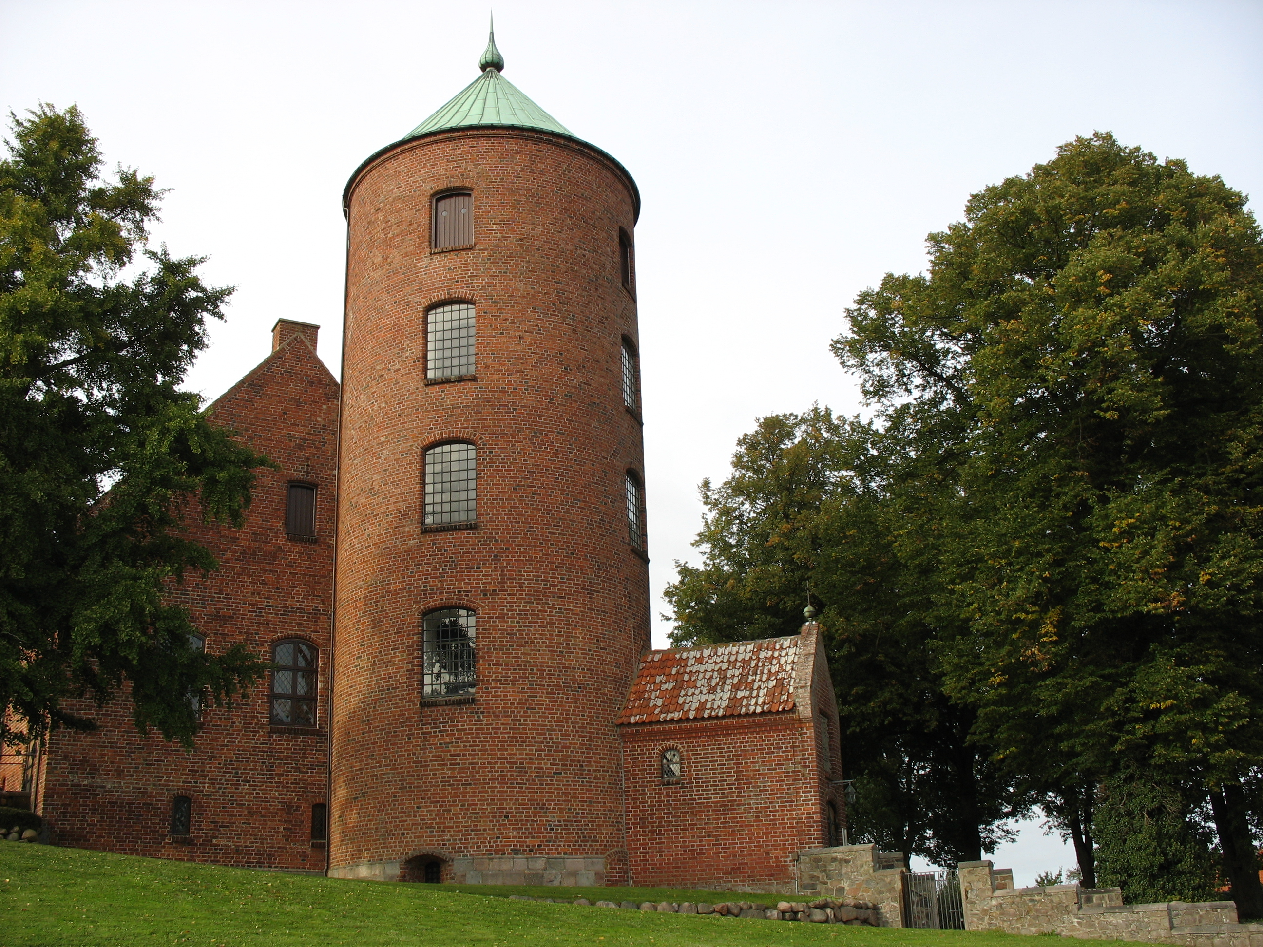 Hjørnetårnet fra Skanderborg Slot - nu tårn for slotskirken.